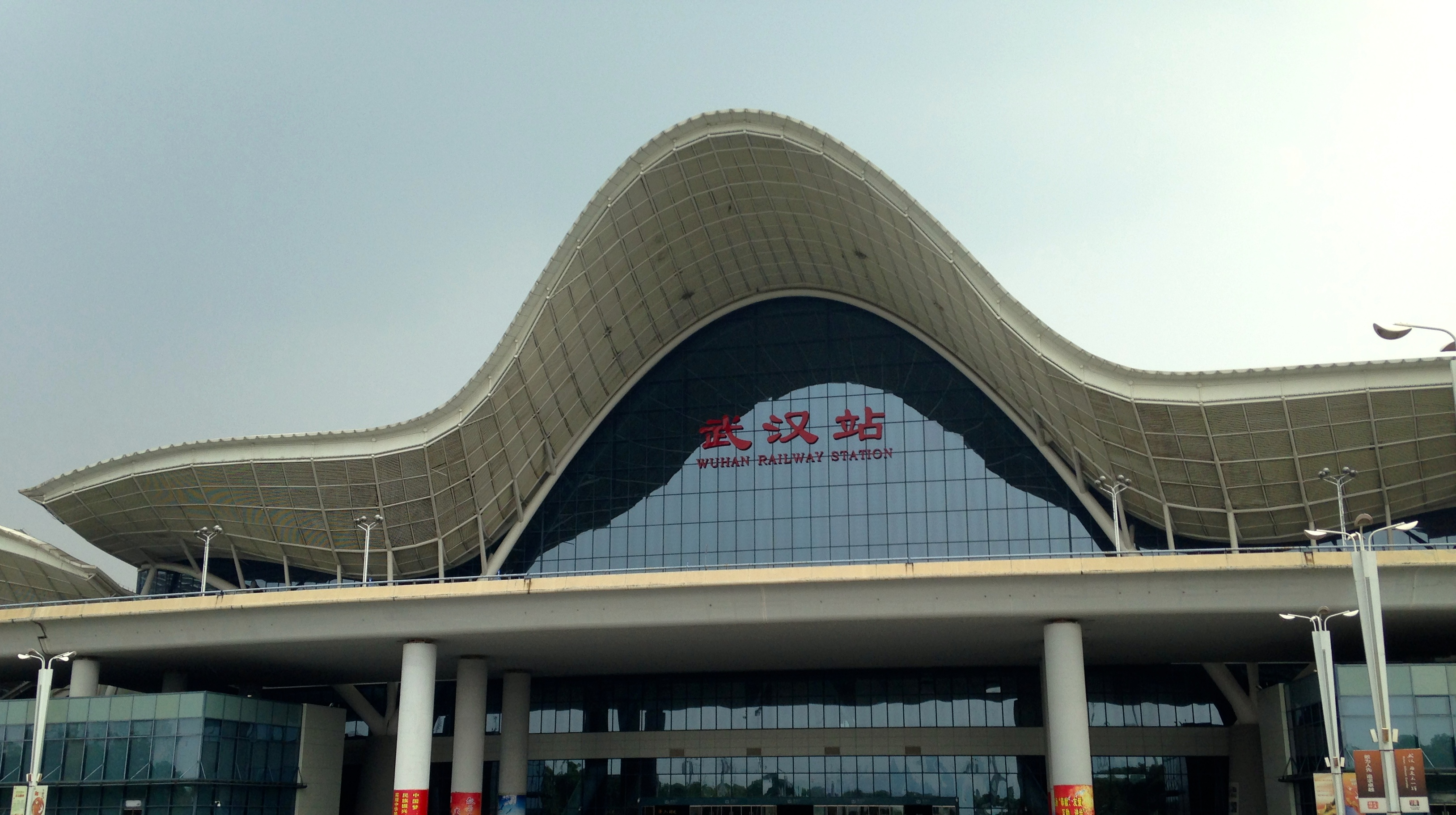 武漢駅の駅舎